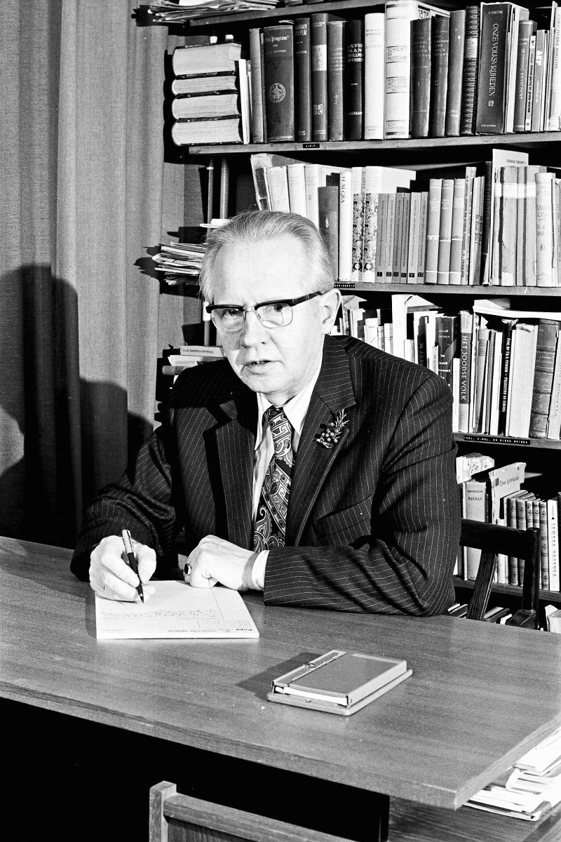 Pieter (Piet) Jongeling (Broek onder Akkerwoude (tegenwoordig Broeksterwoude), 31 maart 1909 – Amersfoort, 26 augustus 1985) was een Nederlandse journalist, verzetsstrijder, politicus en kinderboekenschrijver.